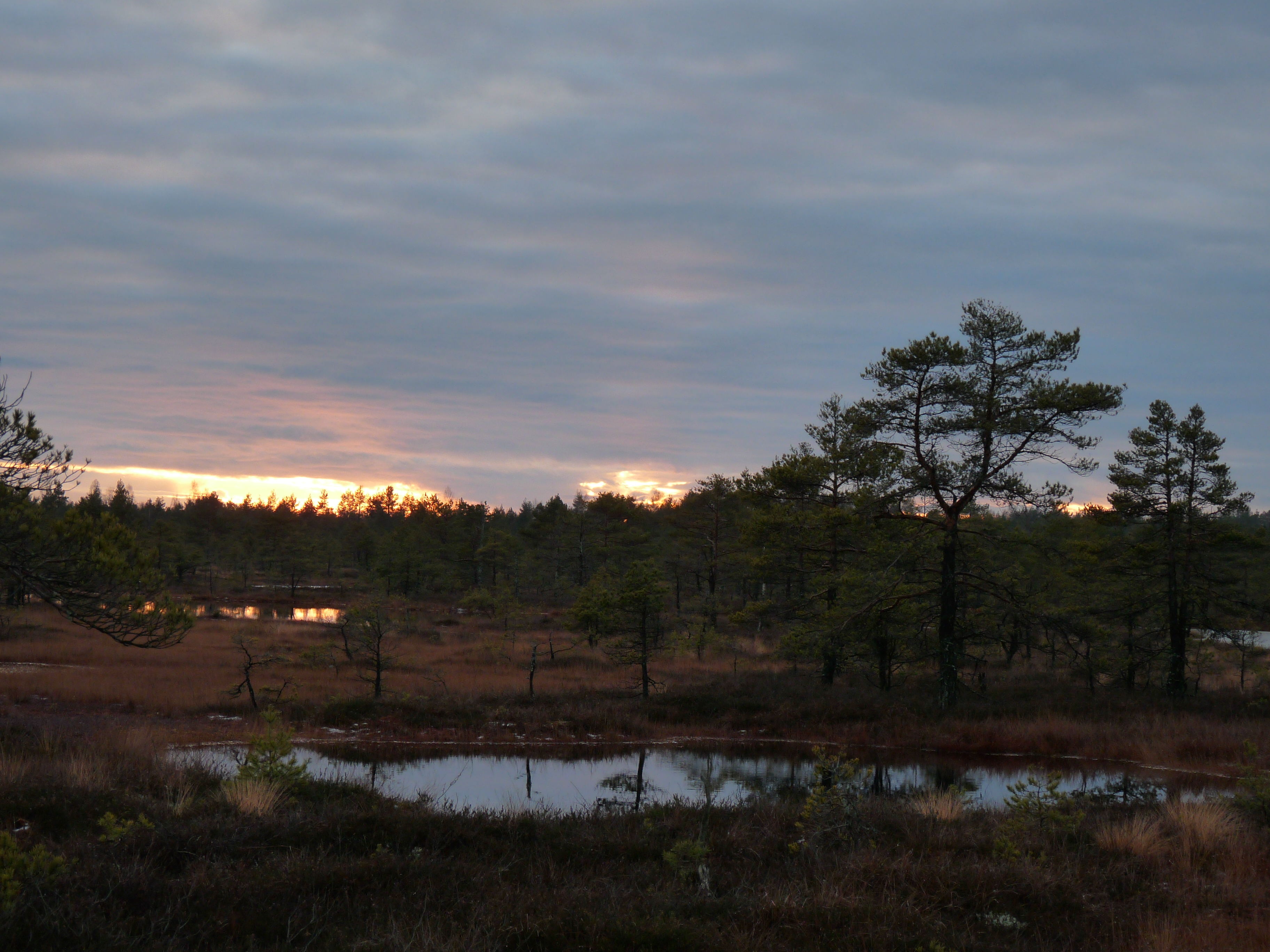 Nõlvasoo hoiuala